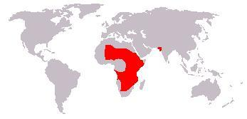 Bewerking afbeelding: afbeelding_(kaart).jpg